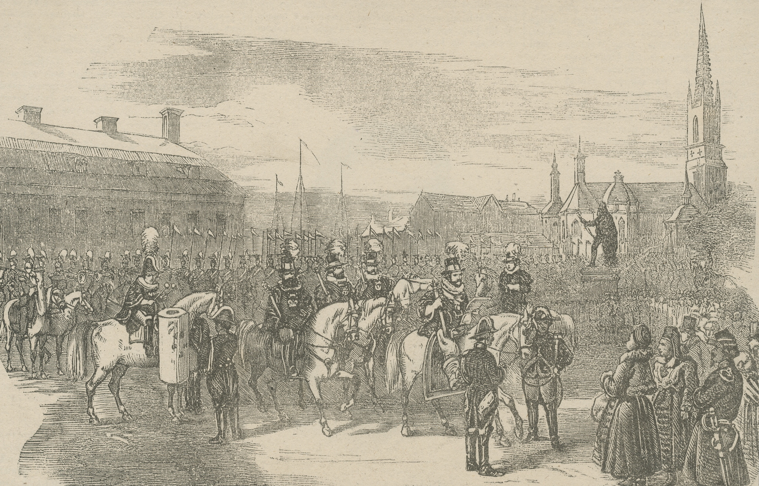 Riksdagen avblåses av Rikshärolden på Riddarhustorget i Stockholm den 22 mars 1858.